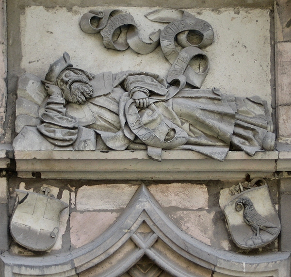 Abbildung des Bischofs Thilo v. Trotha als Supraporte, Domportal